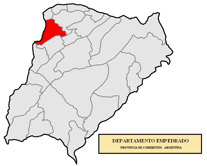 Localización del Departamento Empedrado en la provincia de Corrientes, Argentina Localización del Departamento Empedrado, en la provincia de Corrientes, Argentina.